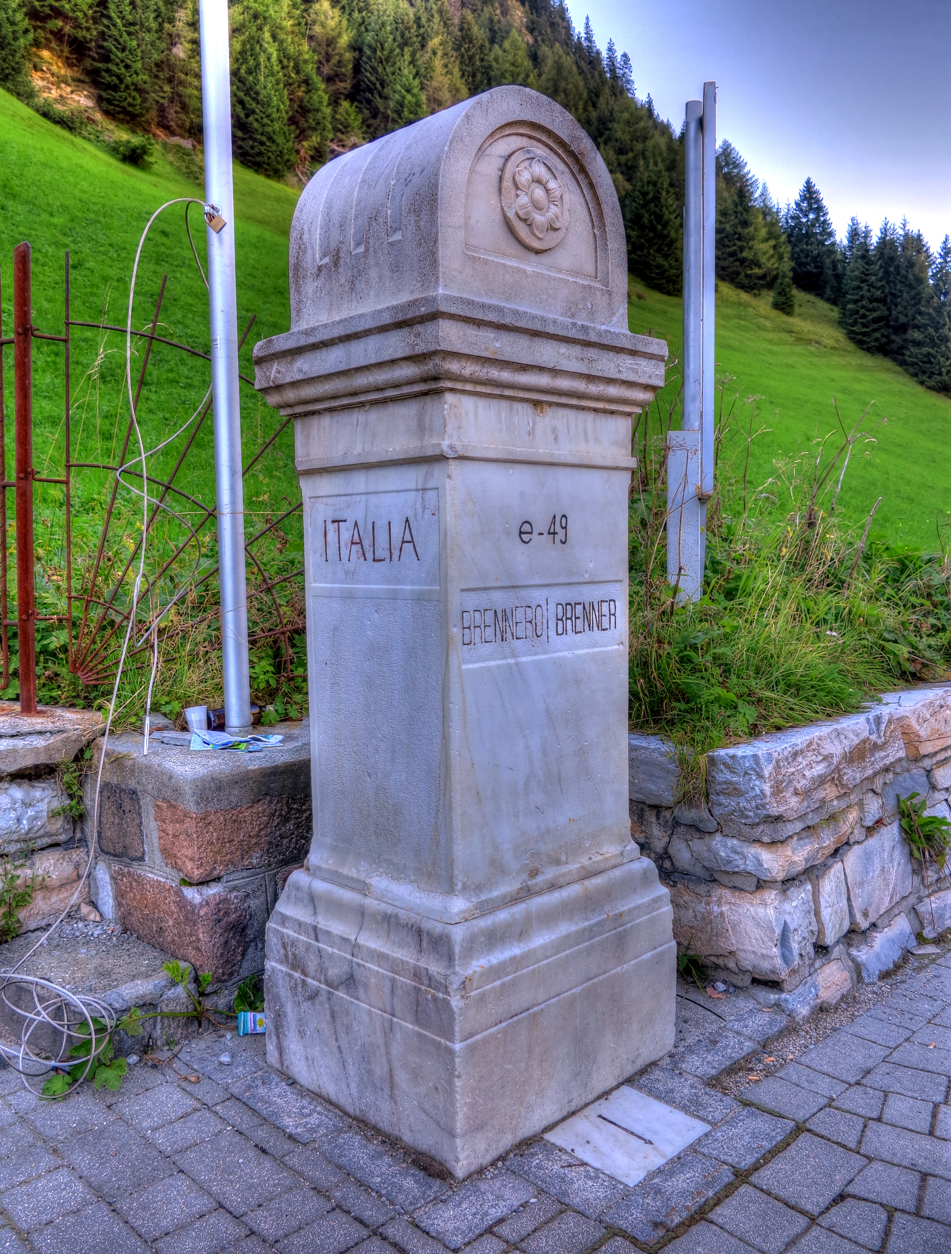 Italien, Brenner, Grenzstein zwischen Italien und Österreich, ca. 2 Meter hoch